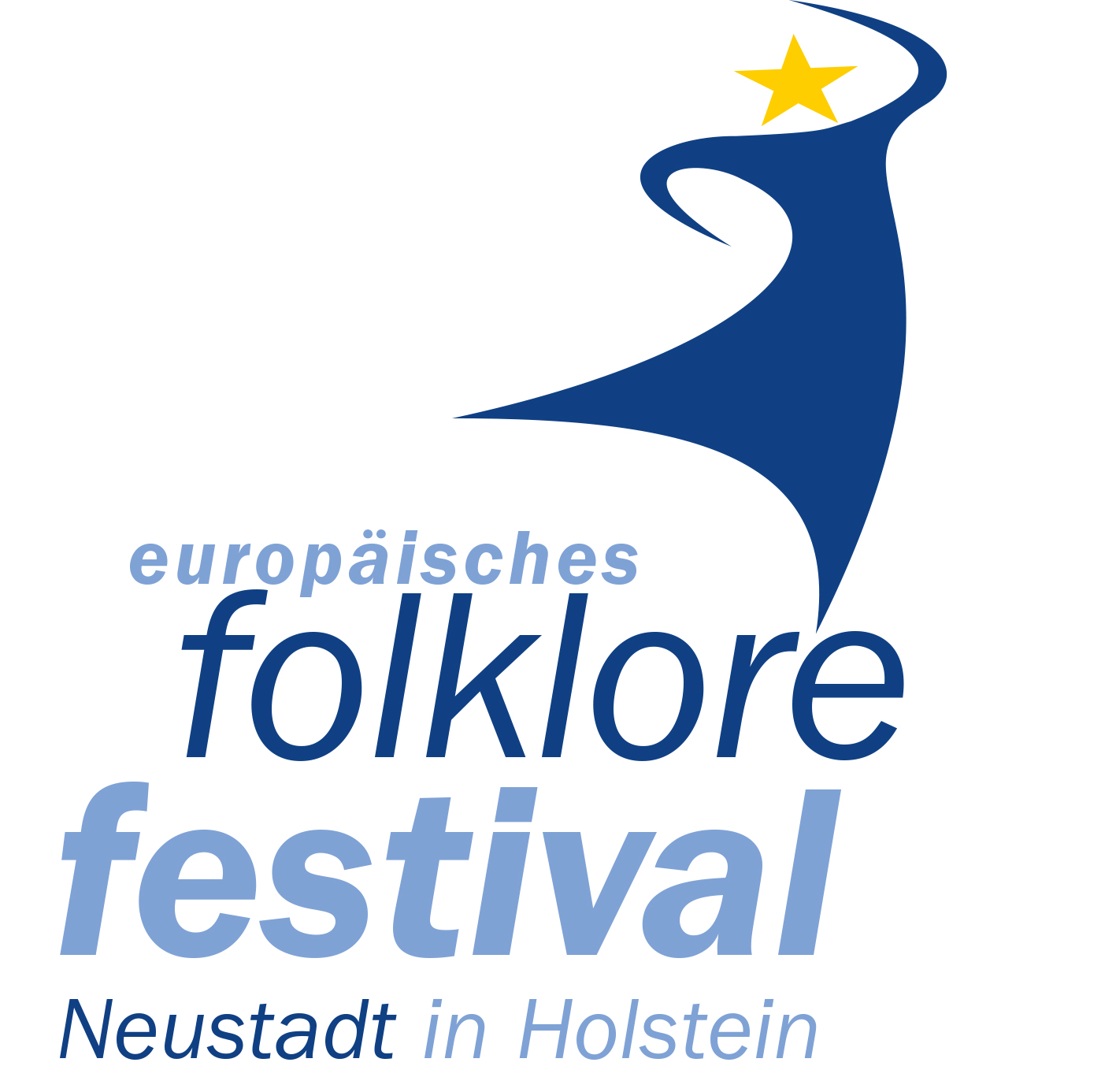 Logo europäisches folklore festival Neustadt in Holstein an der Ostsee